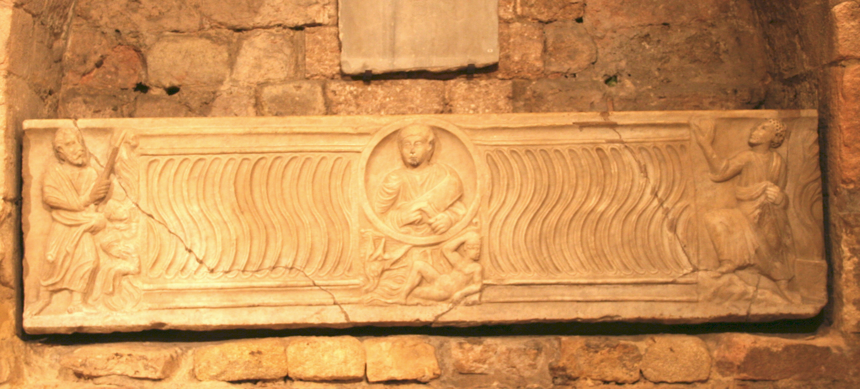 Sarcophage du début du IVe siècle de Sainte Eusébie situé dans les cryptes de l'abbaye de Saint Victor à Marseille.